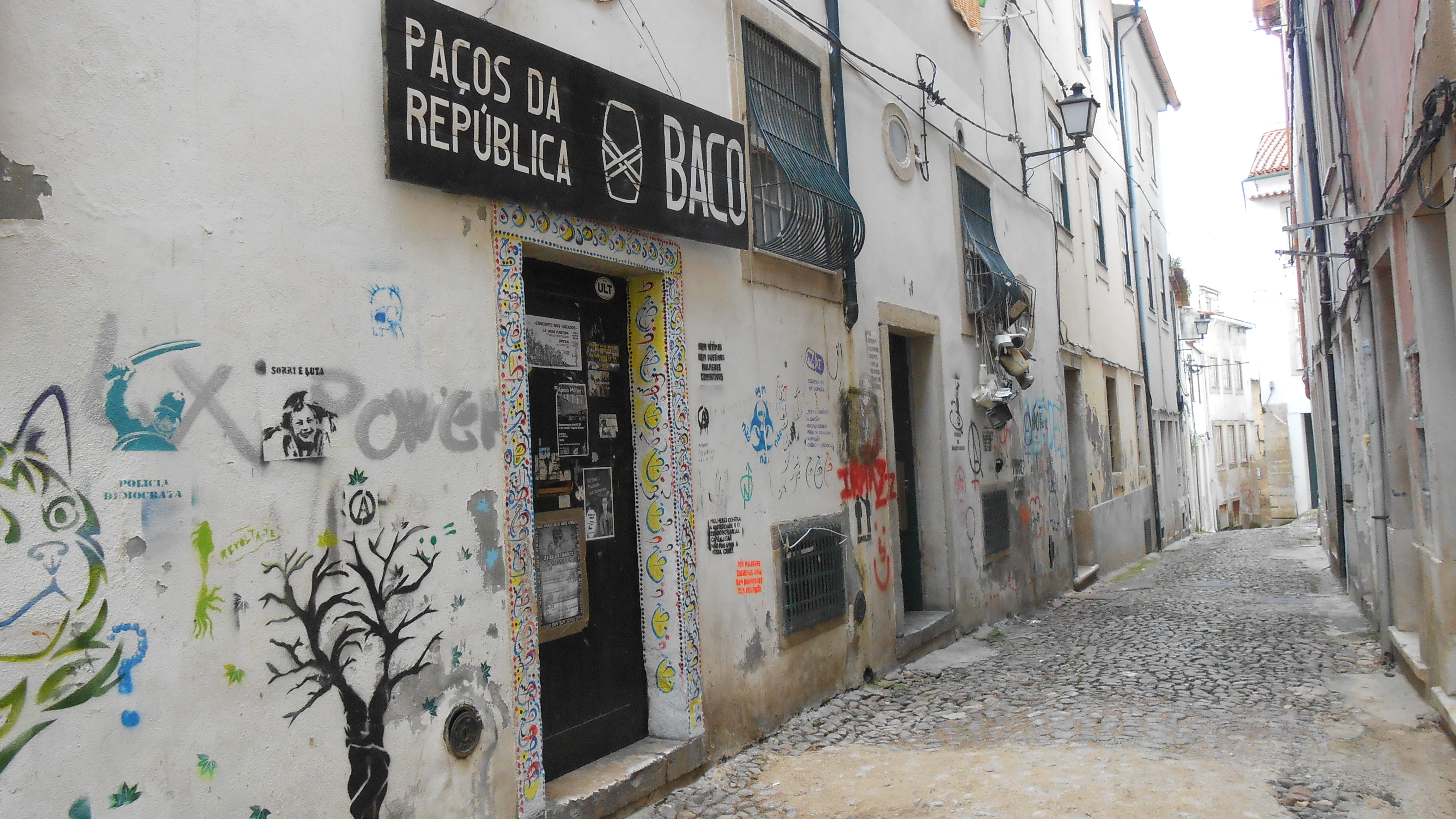 Die República Baco, eine der traditionellen Studentenwohngemeinschaften Coimbras